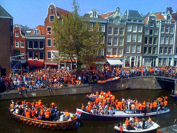 Queen's Day